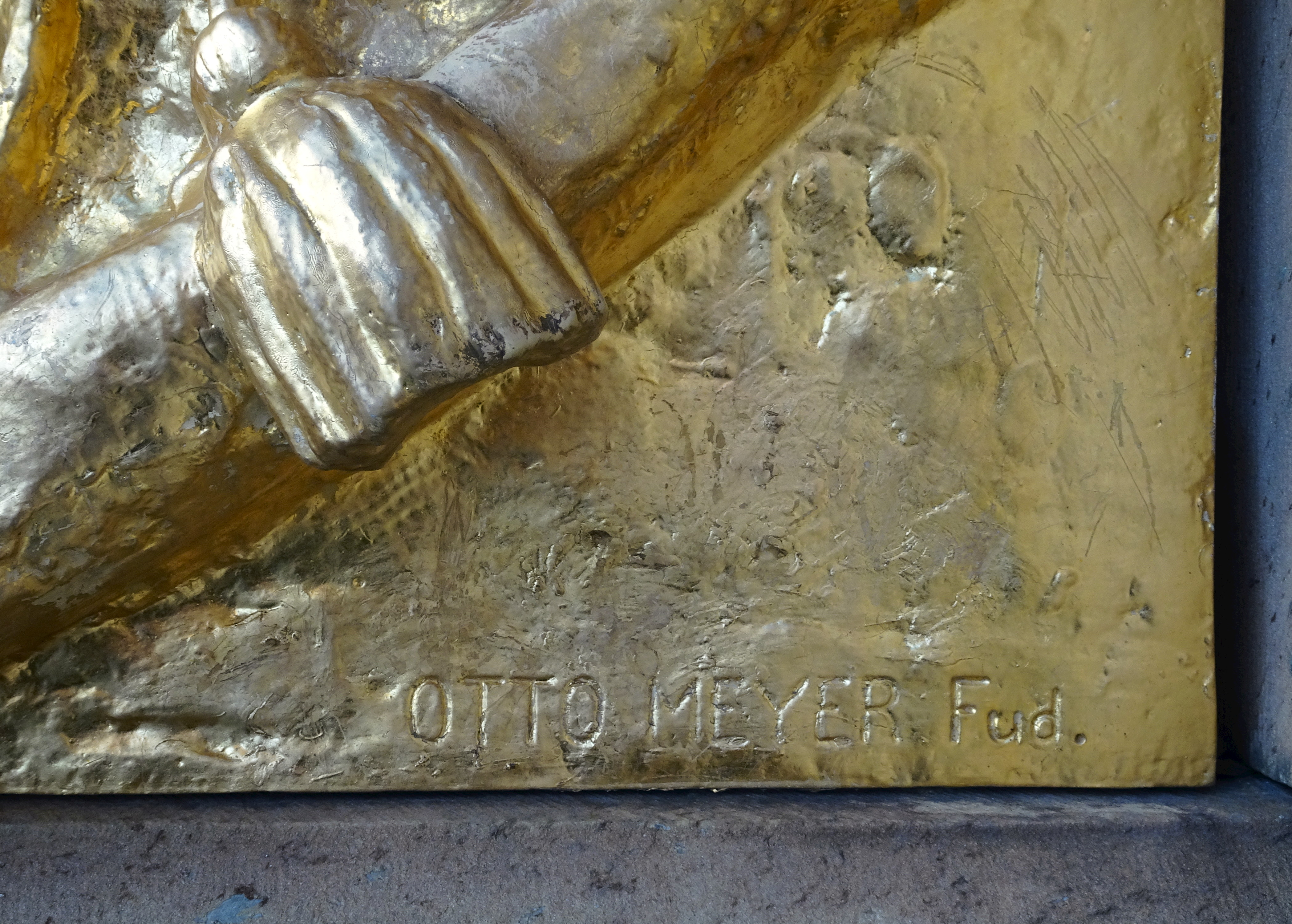 Otto Meyer Fud. gjuteristämpel på Dramatiska teaterns skulptur "Dramatiken" vid entrén.